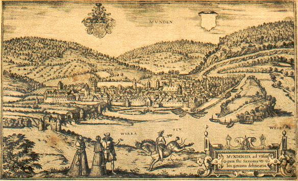 Titel: "Mvnden - Mvndensis, ad Visurgum flu. Saxoniae Vrbis, genuina delineatio.", Münden um 1572 nach einem Stich von Braun-Hogenberg.